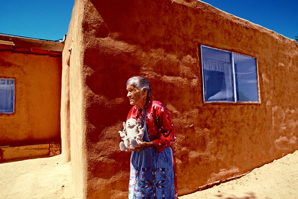 Helen Cordero